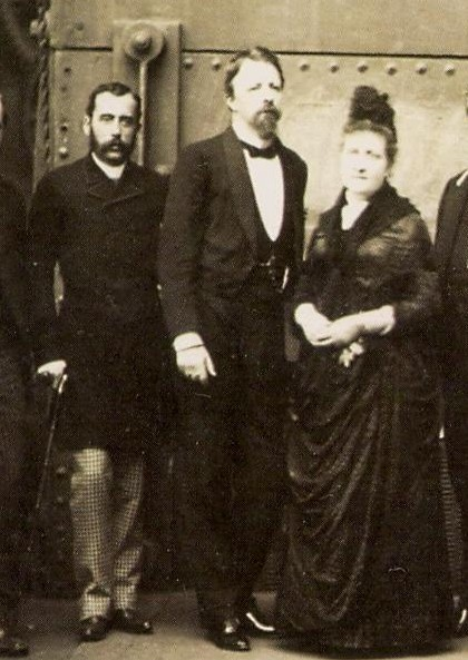 José Carlos de Carvalho, Gaston d´Orléans, e dona Isabel, Princesa Imperial em visita a usina dedicada a fabricação de armamentos militares.